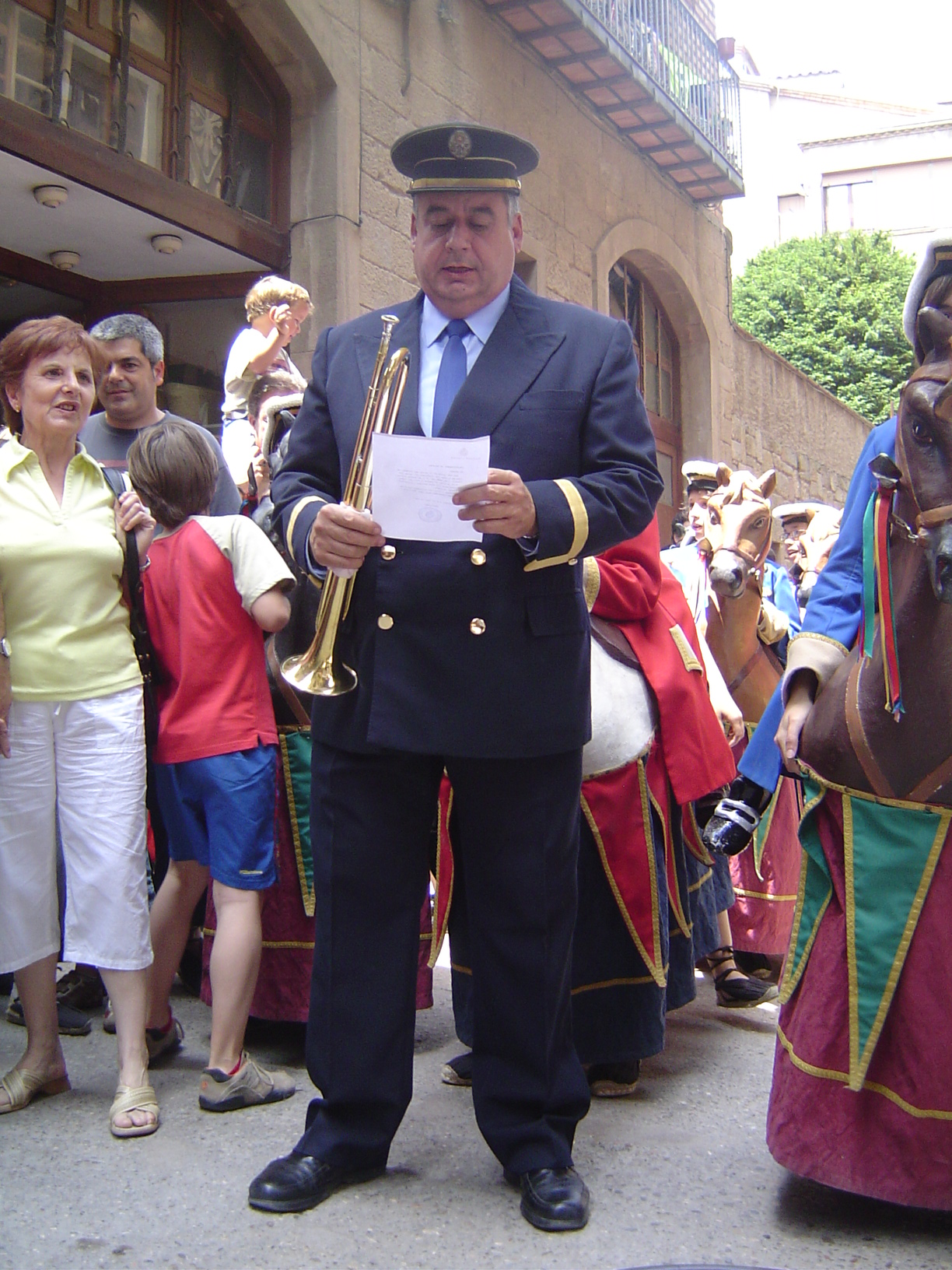 Pregoner municipal de Solsona, realitzant el pregó de la festa durant la vigília de Corpus de 2007.